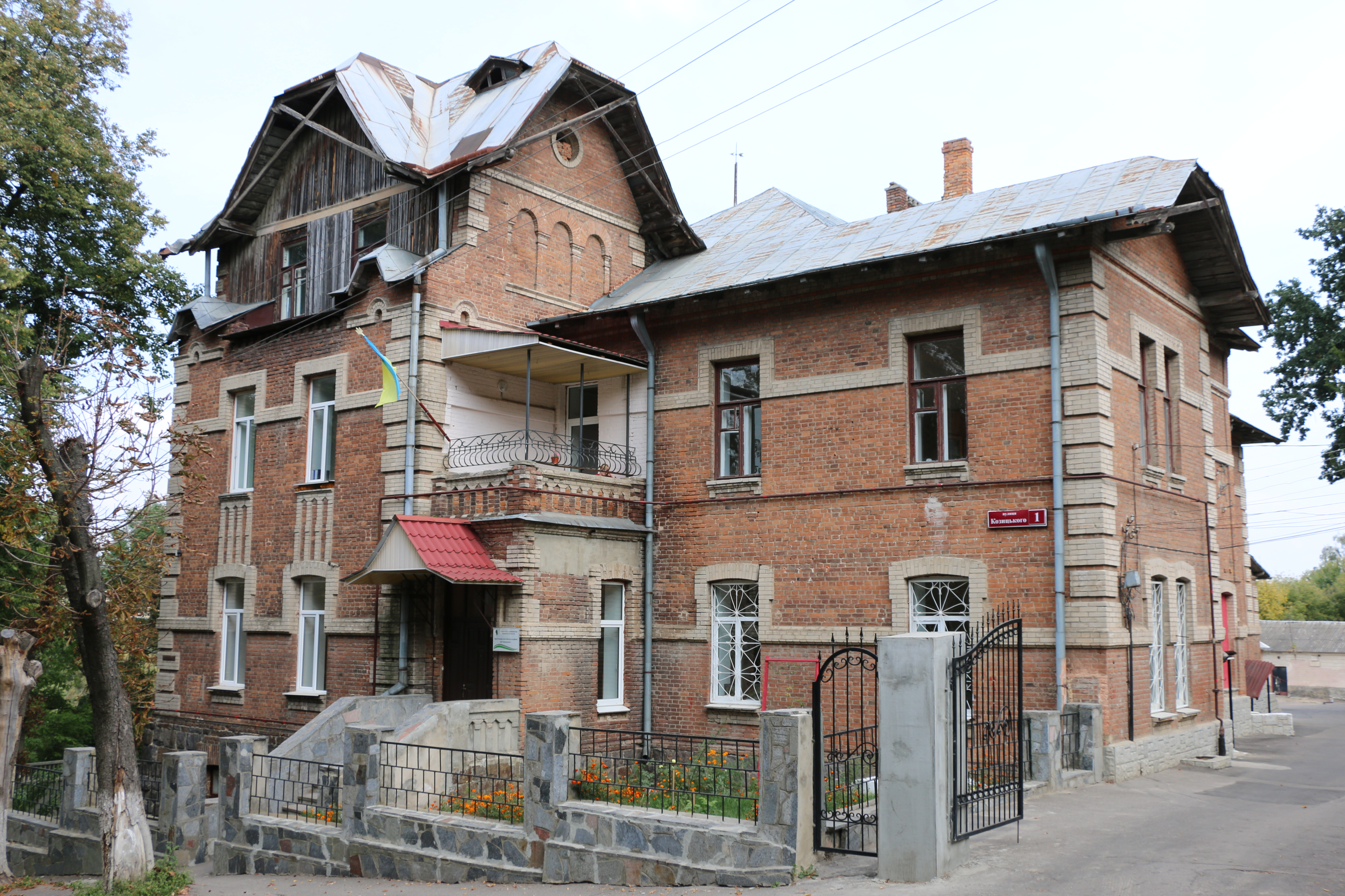 Особняк-лікарня (Палац), Вінниця, вул. Козицького, 1